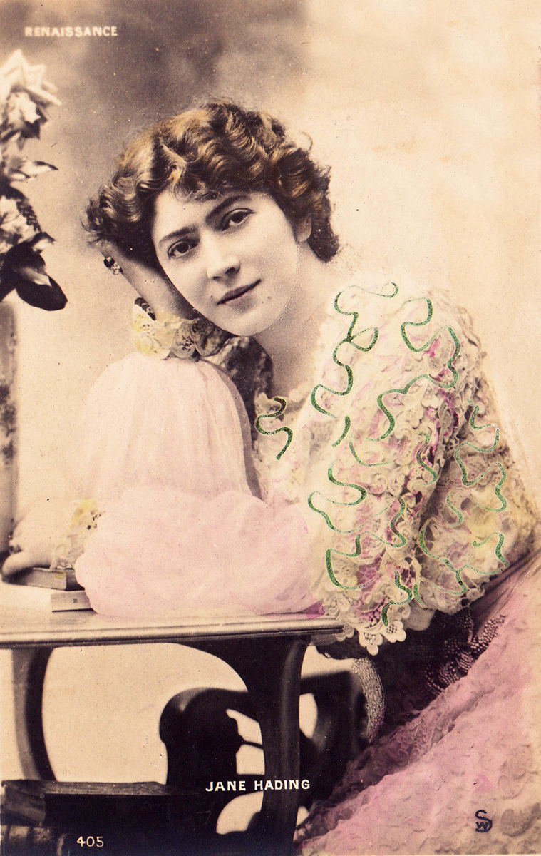 Portrait de la comédienne dramatique Jane Hading, CPA envoyée en 1905, scannée, recolorisée et nettoyée par Malost